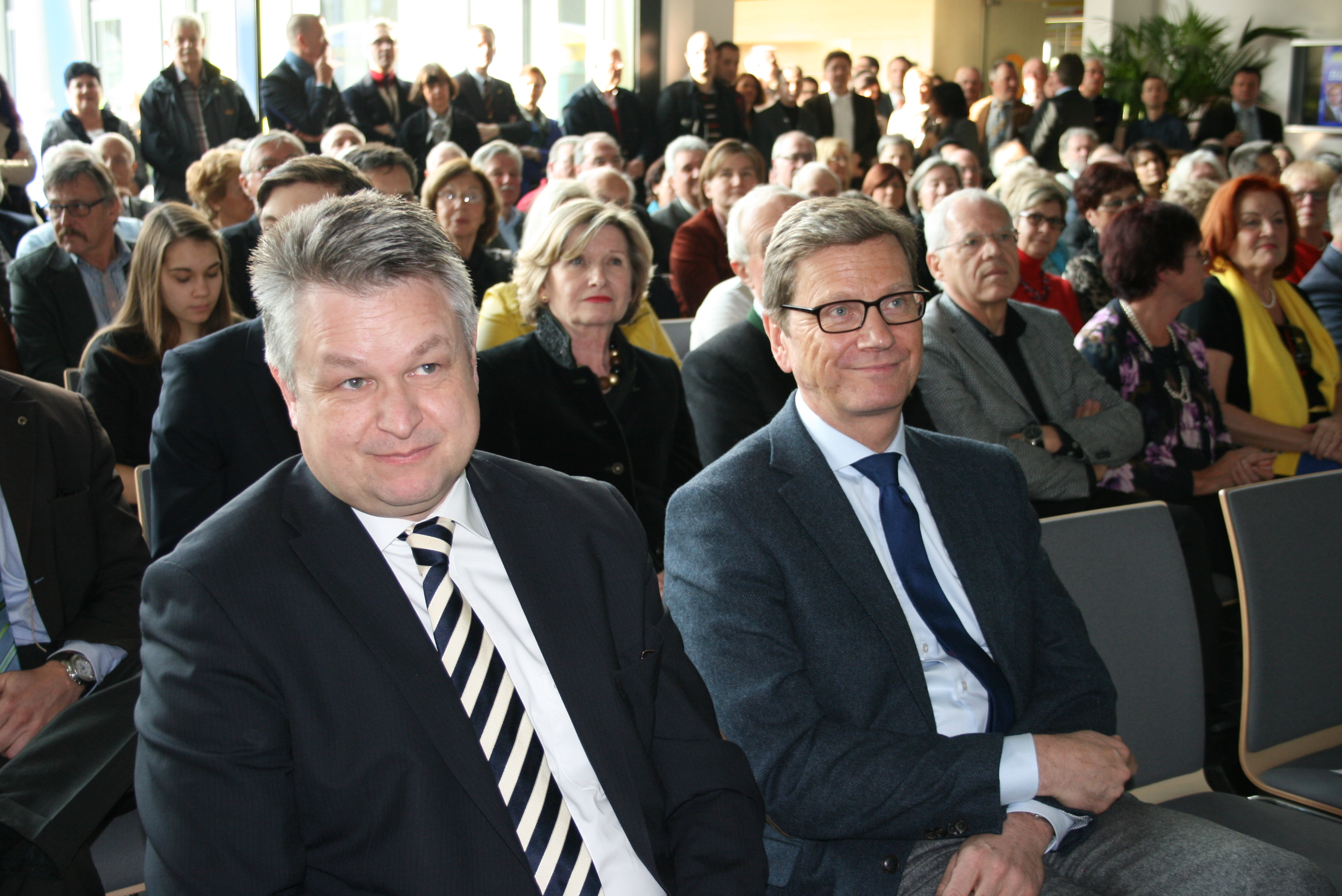 Dr. Guido Westerwelle MdB und Michael Link MdB beim Bürgerempfang der FDP Heilbronn am 3. März 2013